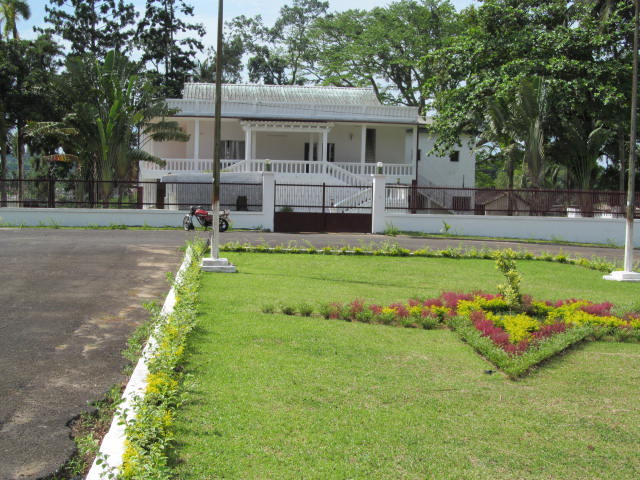 Résidence du prefet d'Edea au Cameroun